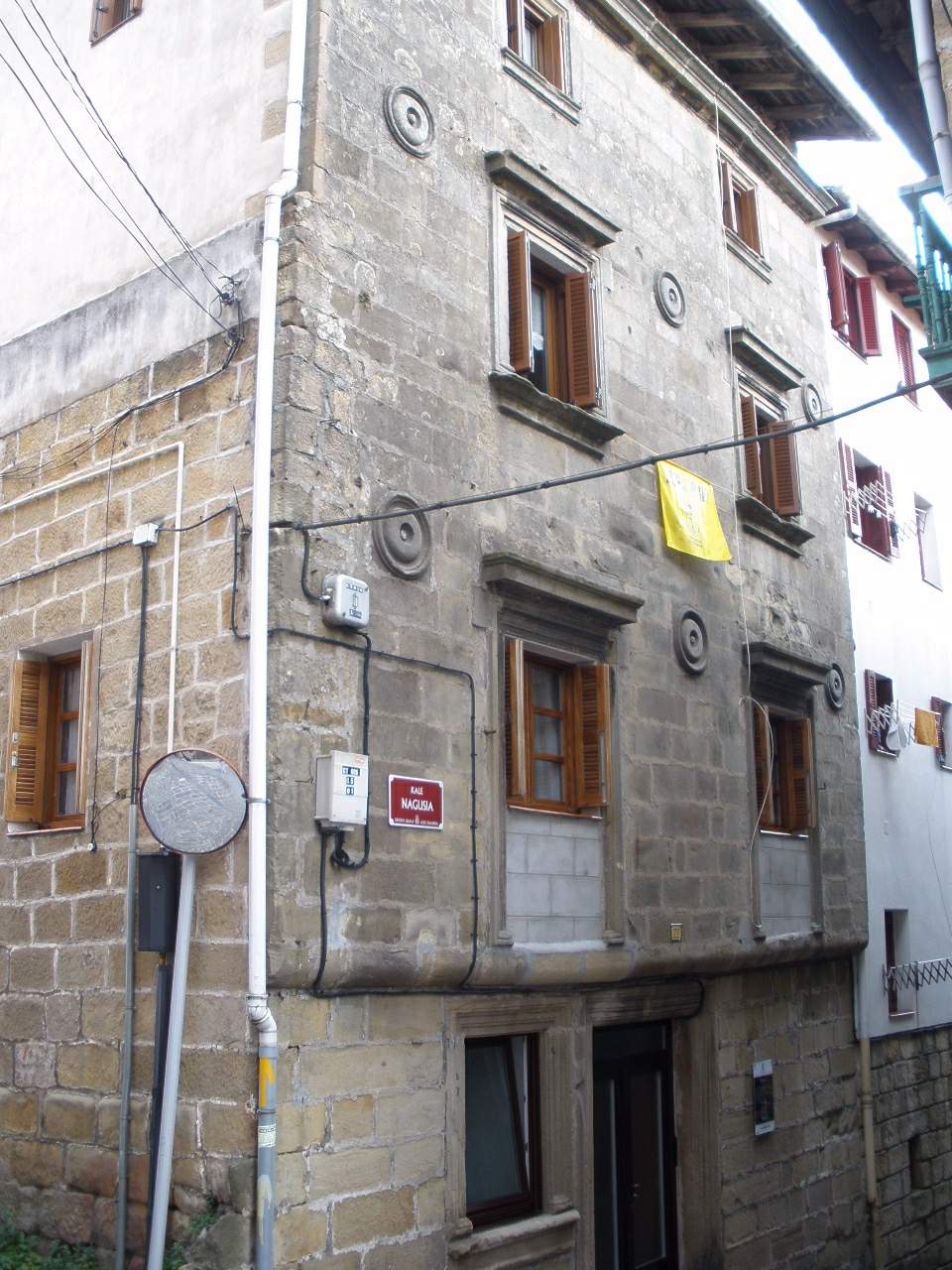 Orio (Gipuzkoa)